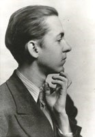 Jean Dallaire